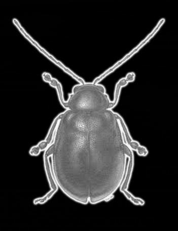 Coleóptero Typhodes Chrysomelidae